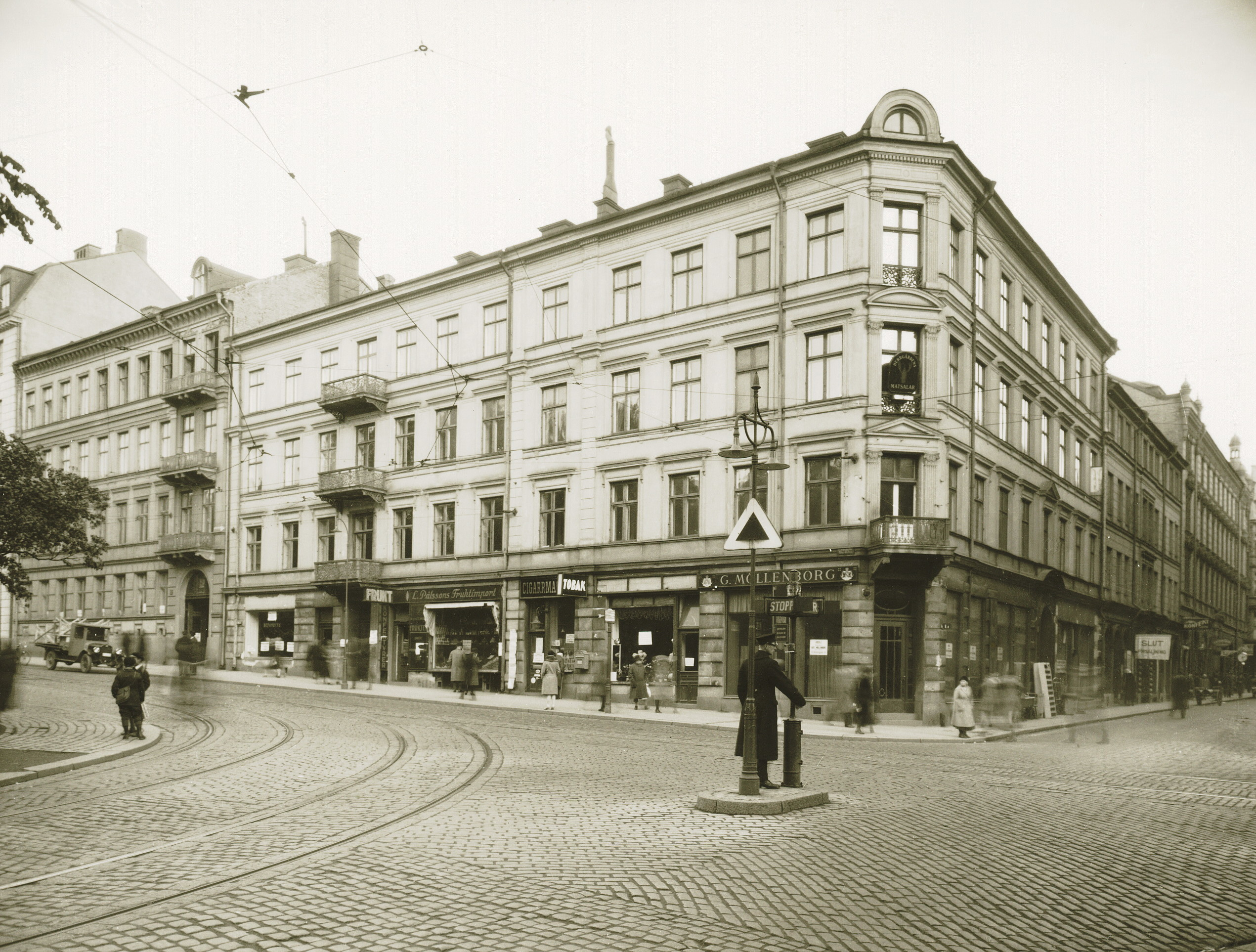 Humlegården 57, Sturegatan 10-12, byggnaden som ersattes 1930 av Eden Hotel.